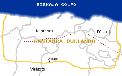 Traduko de :dosiero:Ducado de Cantabria.png Duklando Kantabrio